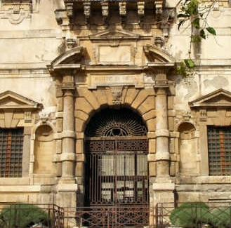 Messina Palace Monte di pietà